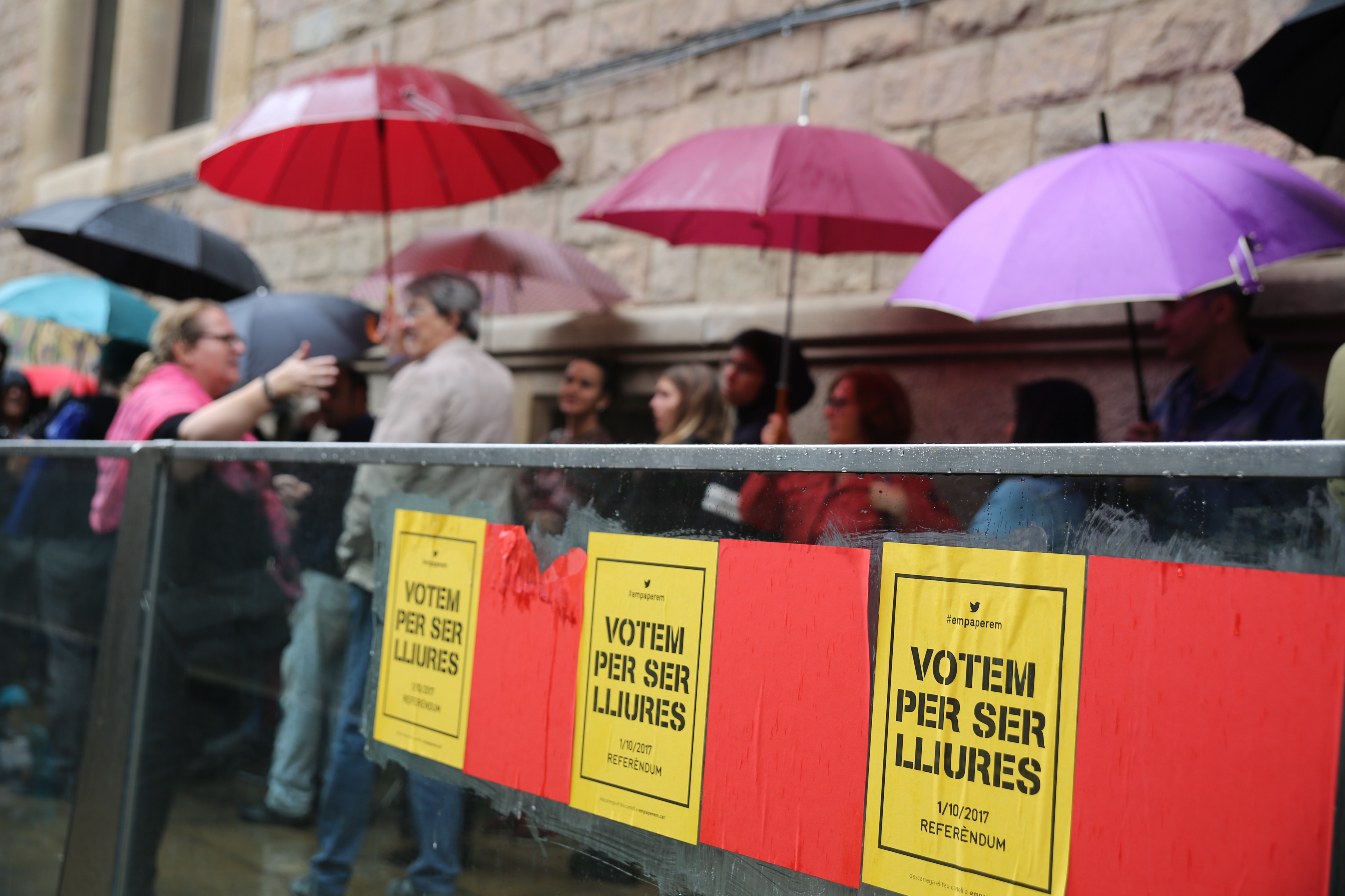 Referendum de independencia de Cataluña del 1 de octubre de 2017 Wikipedia: Catalan independence referendum, 2017 See alsocategory: Catalan independence referendum, 2017.